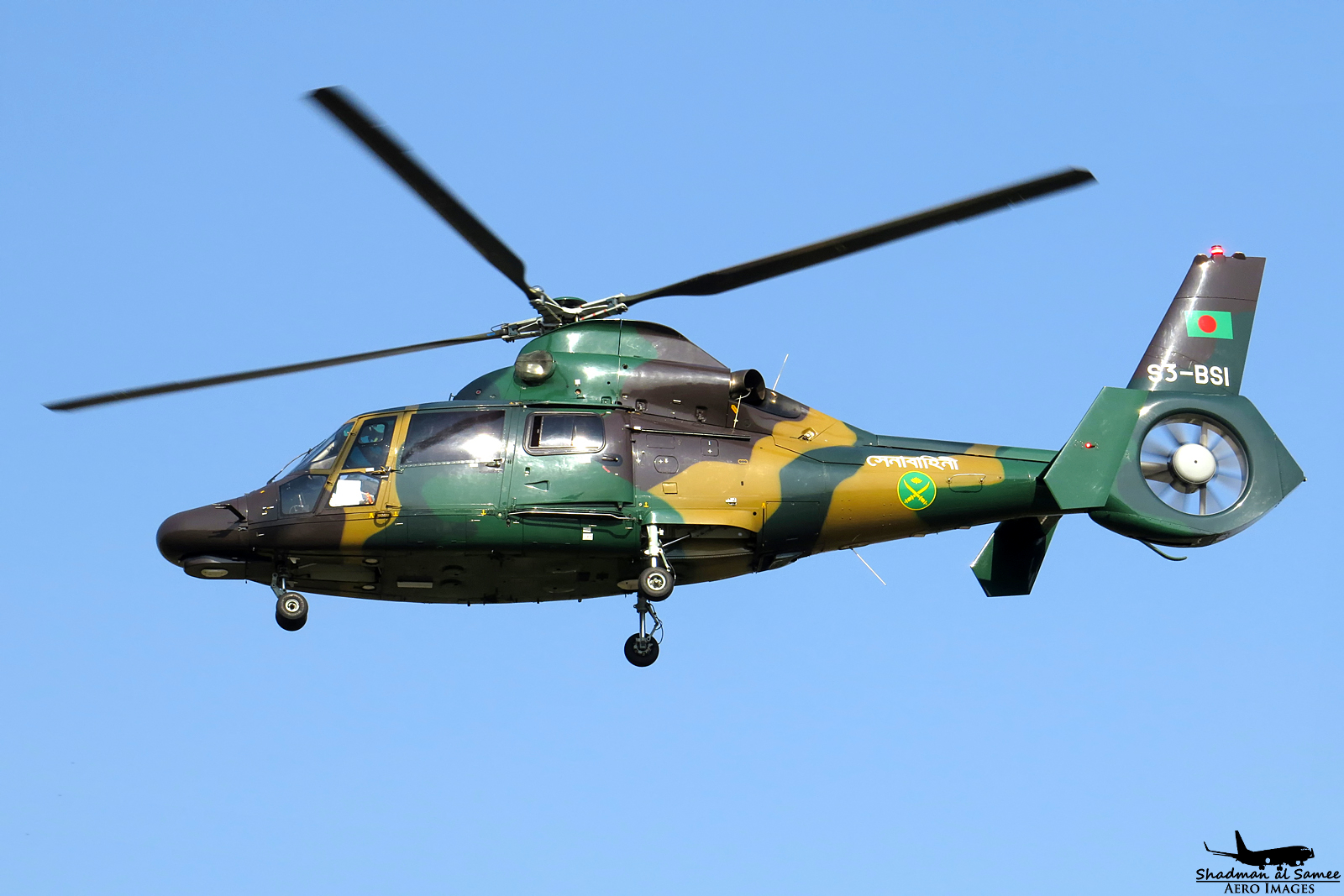 VGTJ/ BAF BSR 2017.